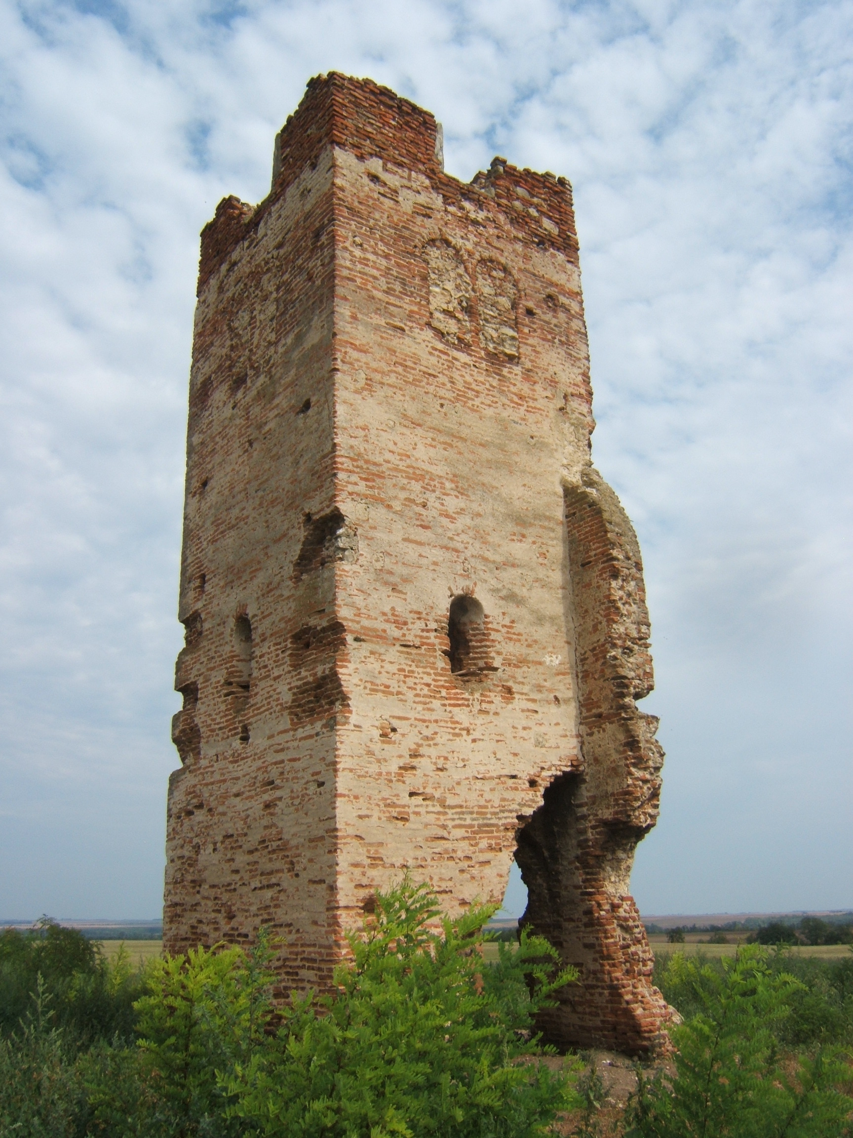 Ádánd, templomrom